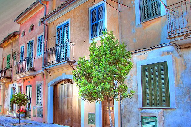 Mediterranes Stadleben von Palma